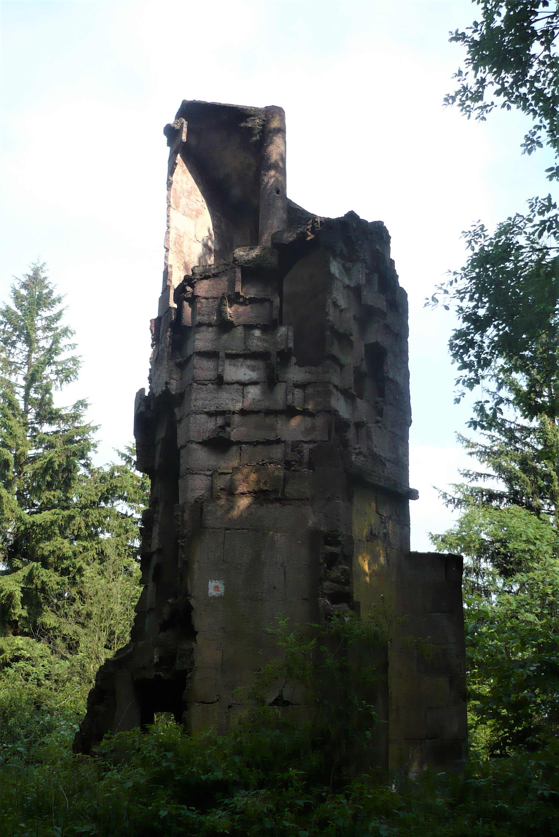 Włodzicka Góra